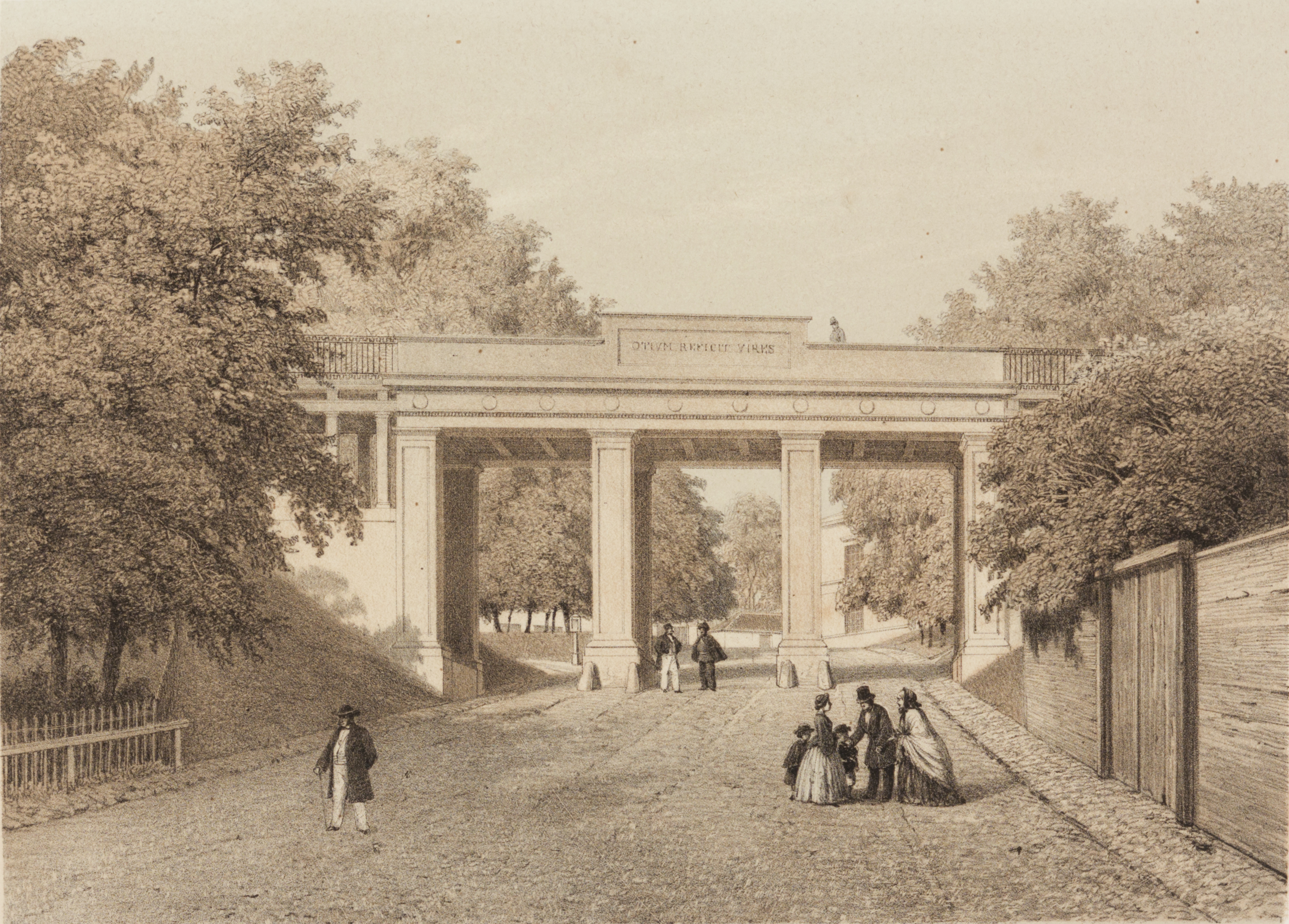 Tartu album. Esimene Toome sild. MUIS: TKM TR 4038 H 31:14